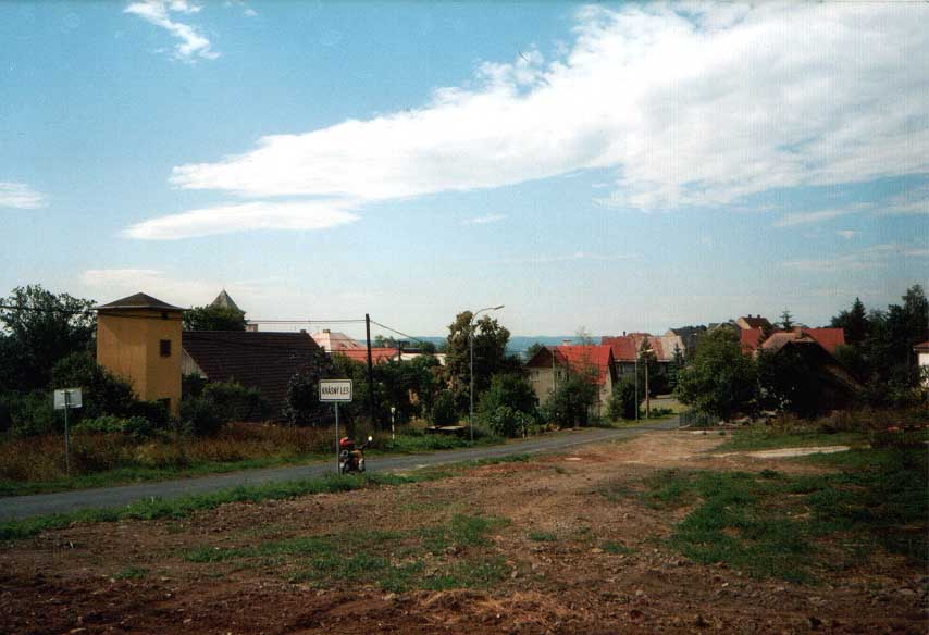 Obec Krásný Les, okres Karlovy Vary